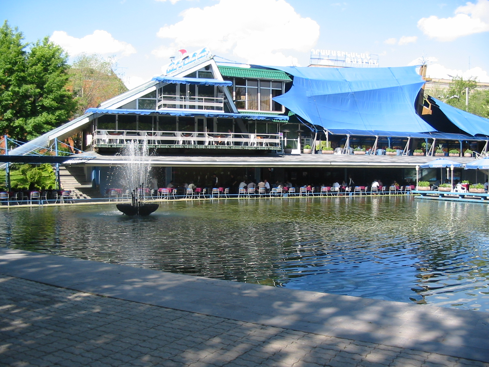 Parc de Poplavok à Erevan